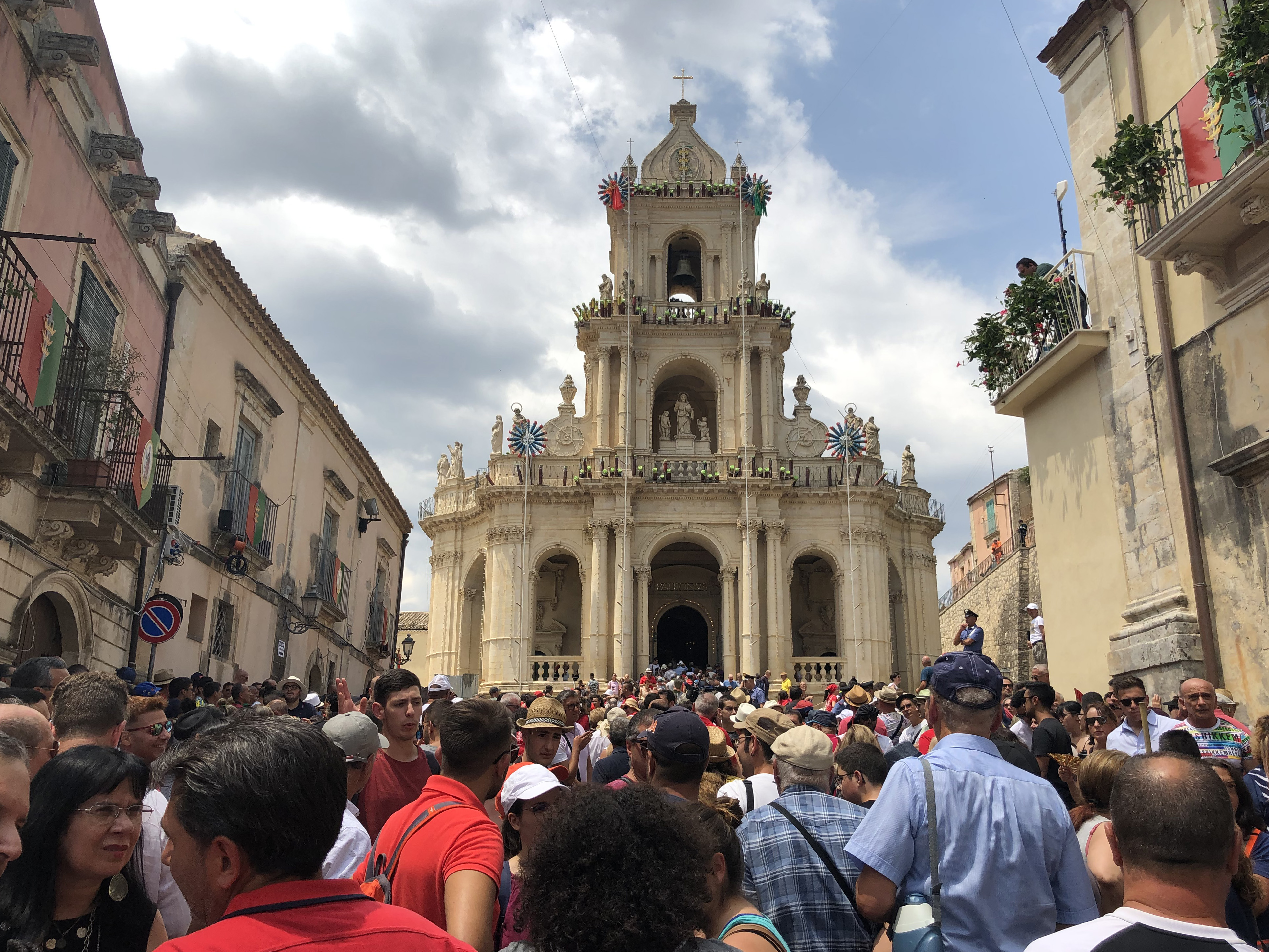 Festa di San Paolo a Palazzolo Acreide